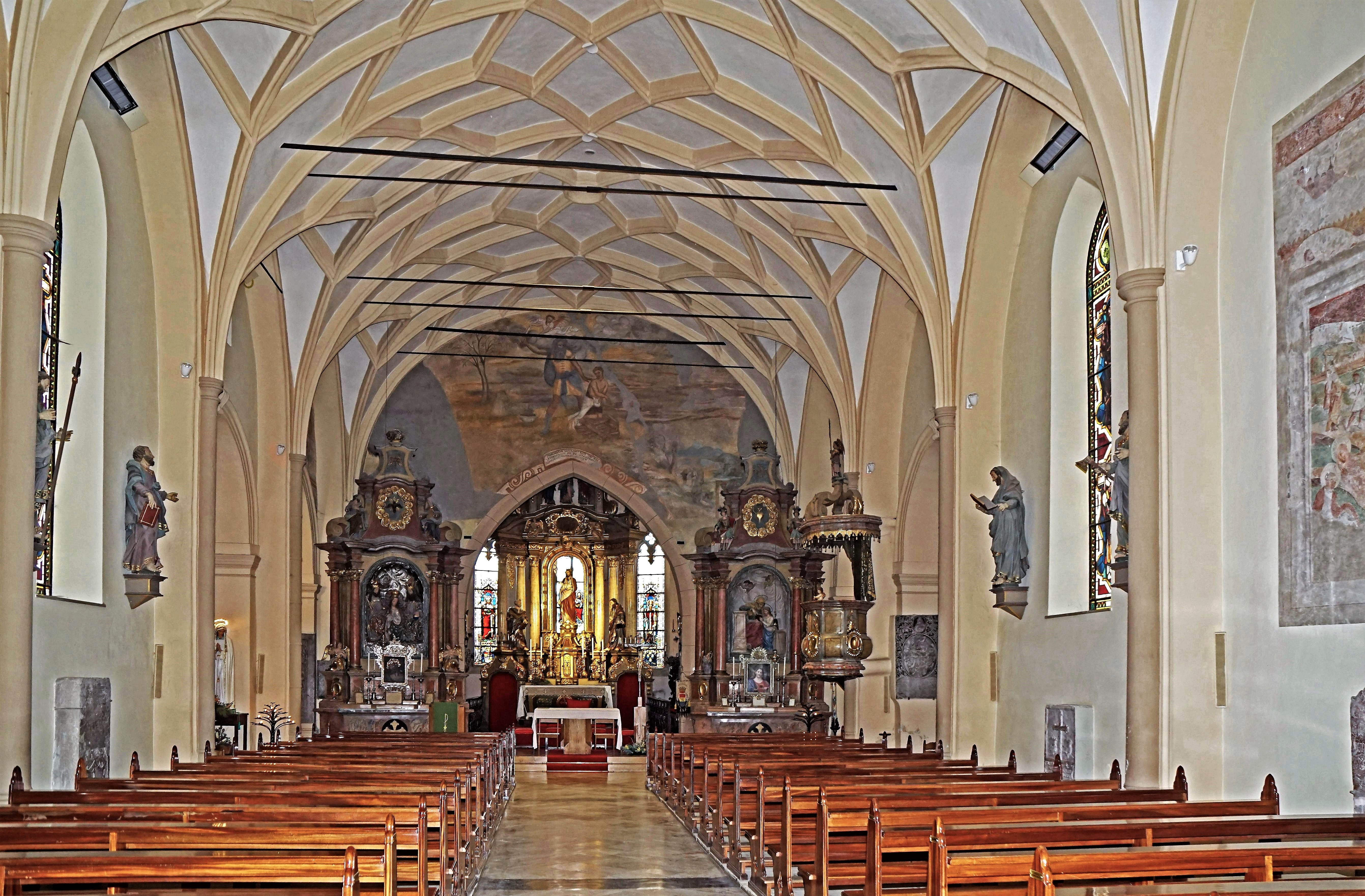 Pfarrkirche Sankt Peter und Paul (Tarvis), Innenansicht